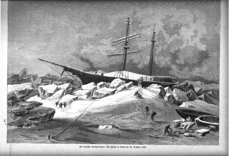 Nordpol-Expeditionsschiff "Hansa" in Not.